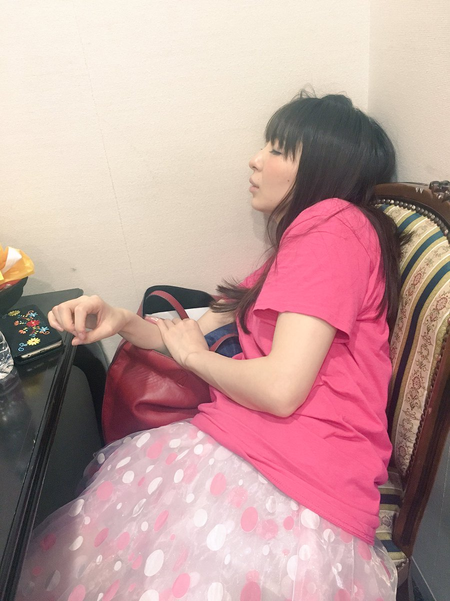 さな